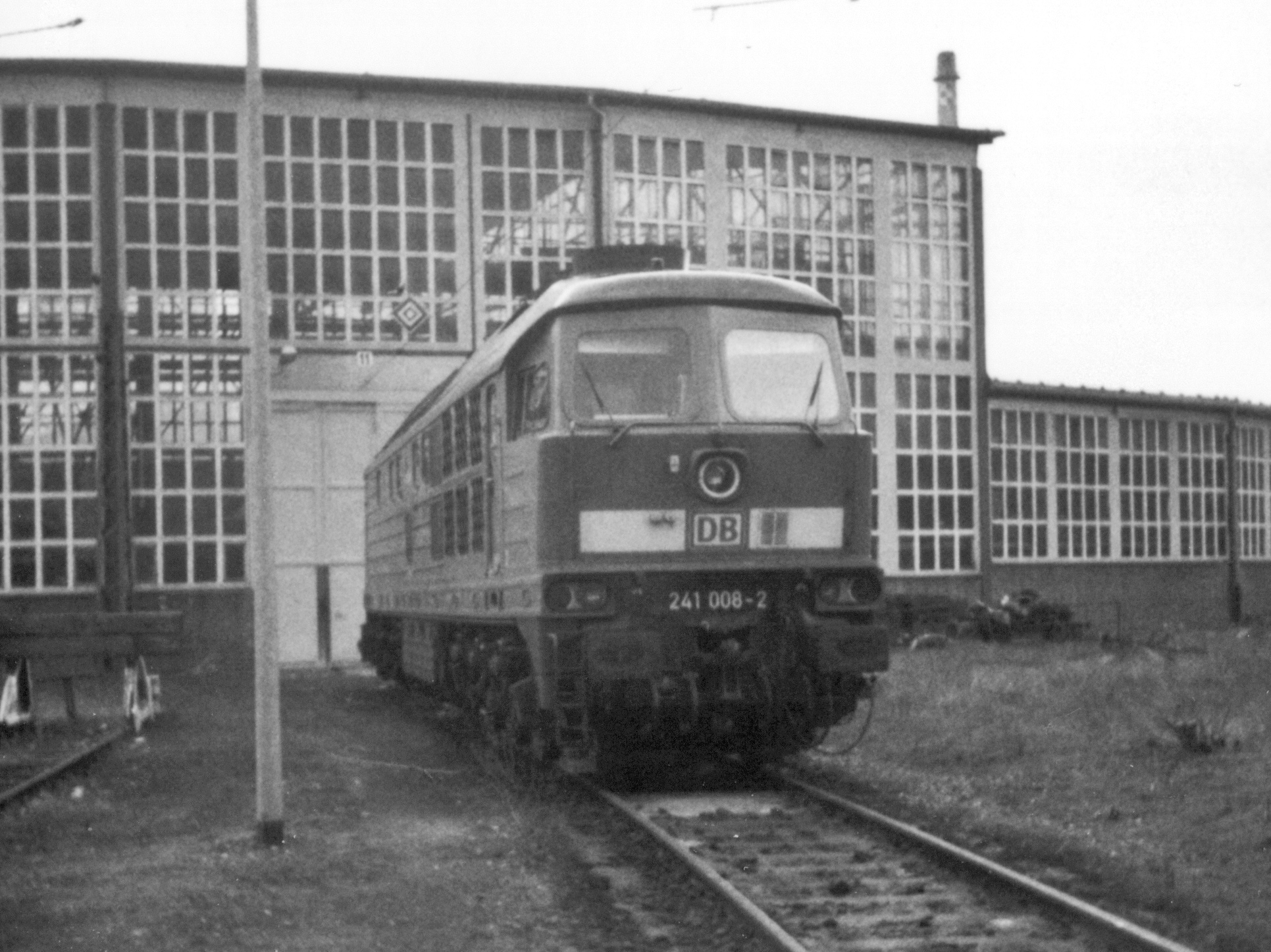 DB 241 008-2 (ex DB 232 008-3 in Blankenburg (Harz)